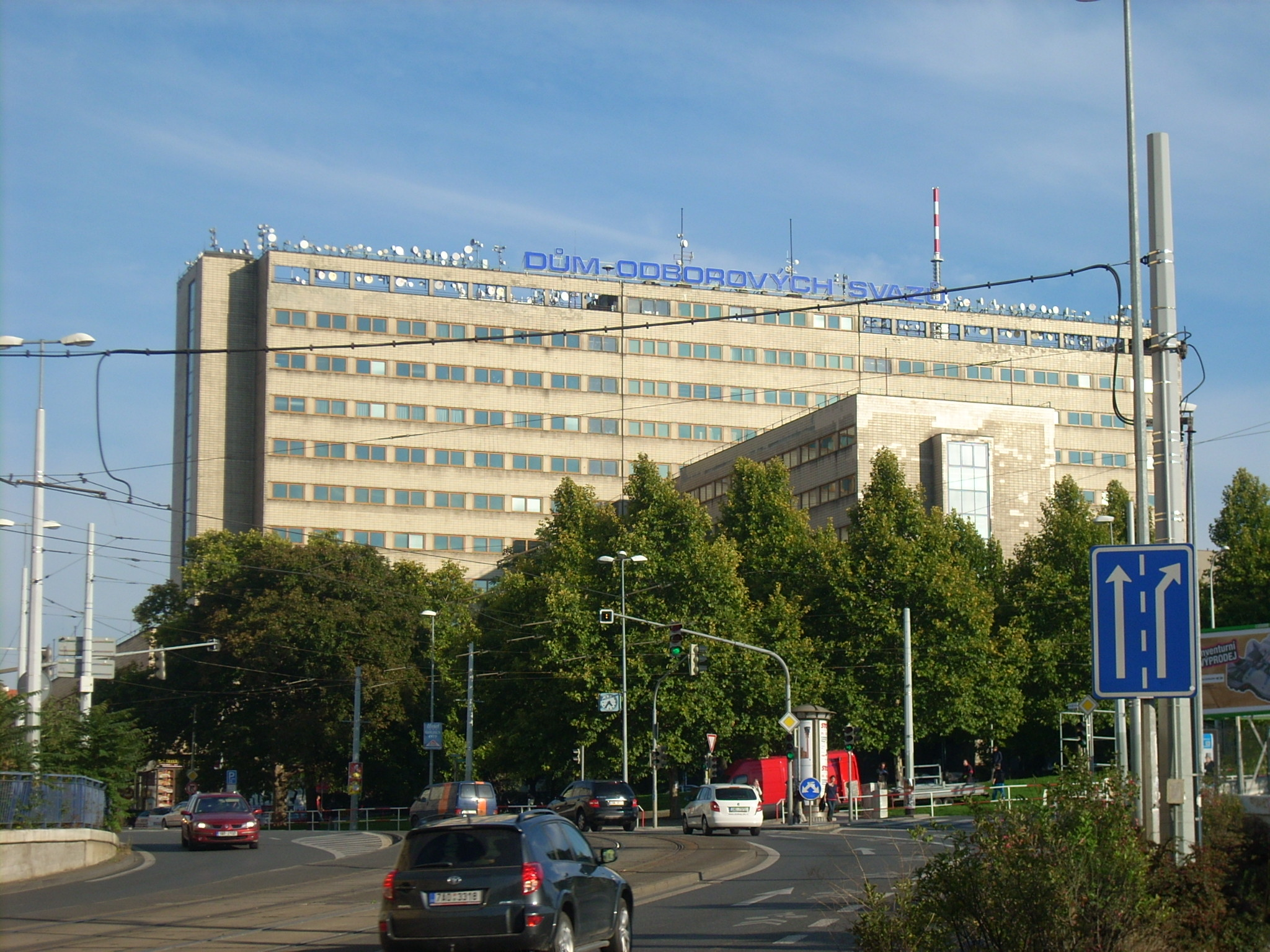 Všeobecný penzijní ústav, Praha 3, nám. Winstona Churchilla 1800/2, Žižkov